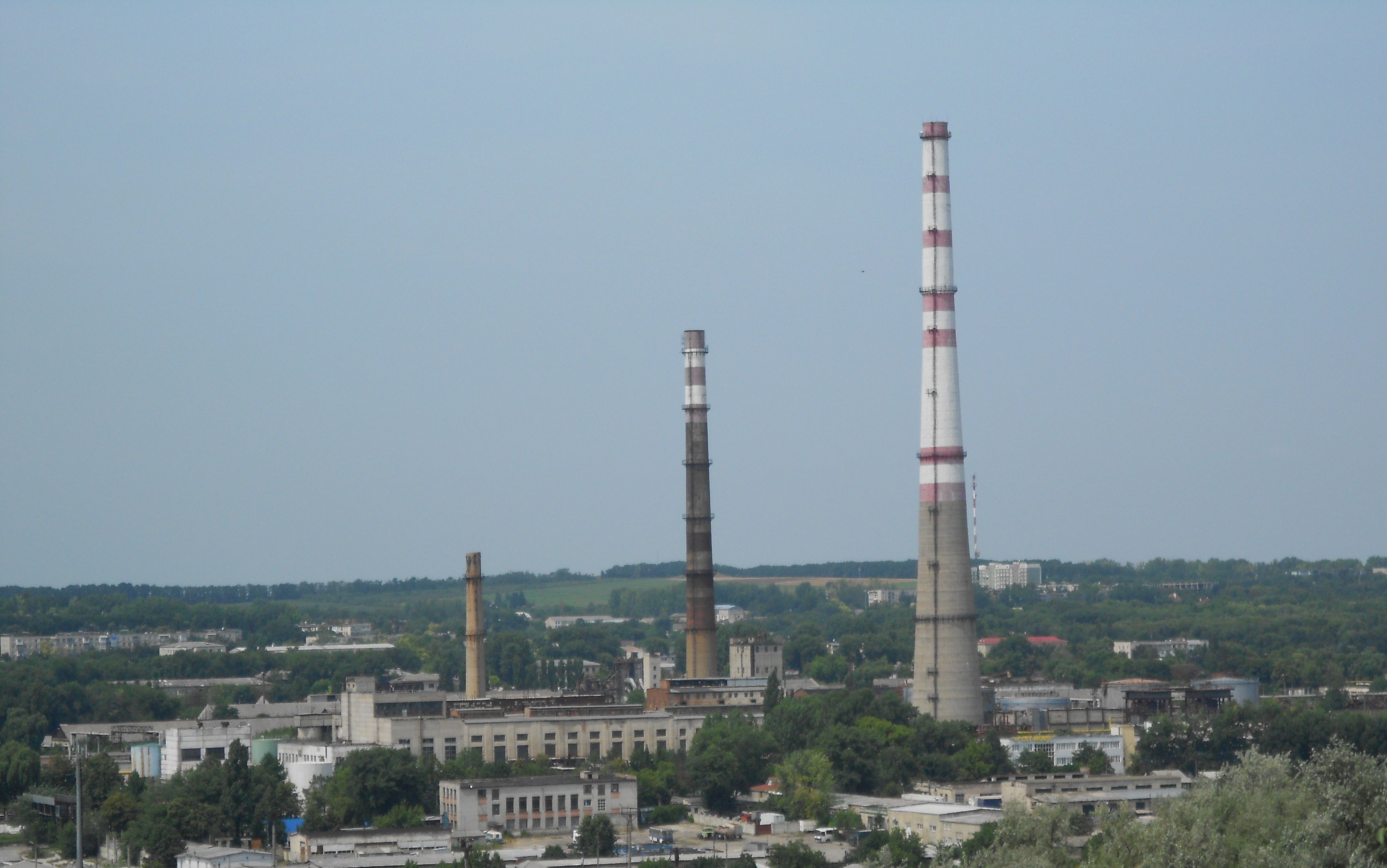 Centrala Electrică cu Termoficare CET-Nord din Bălți